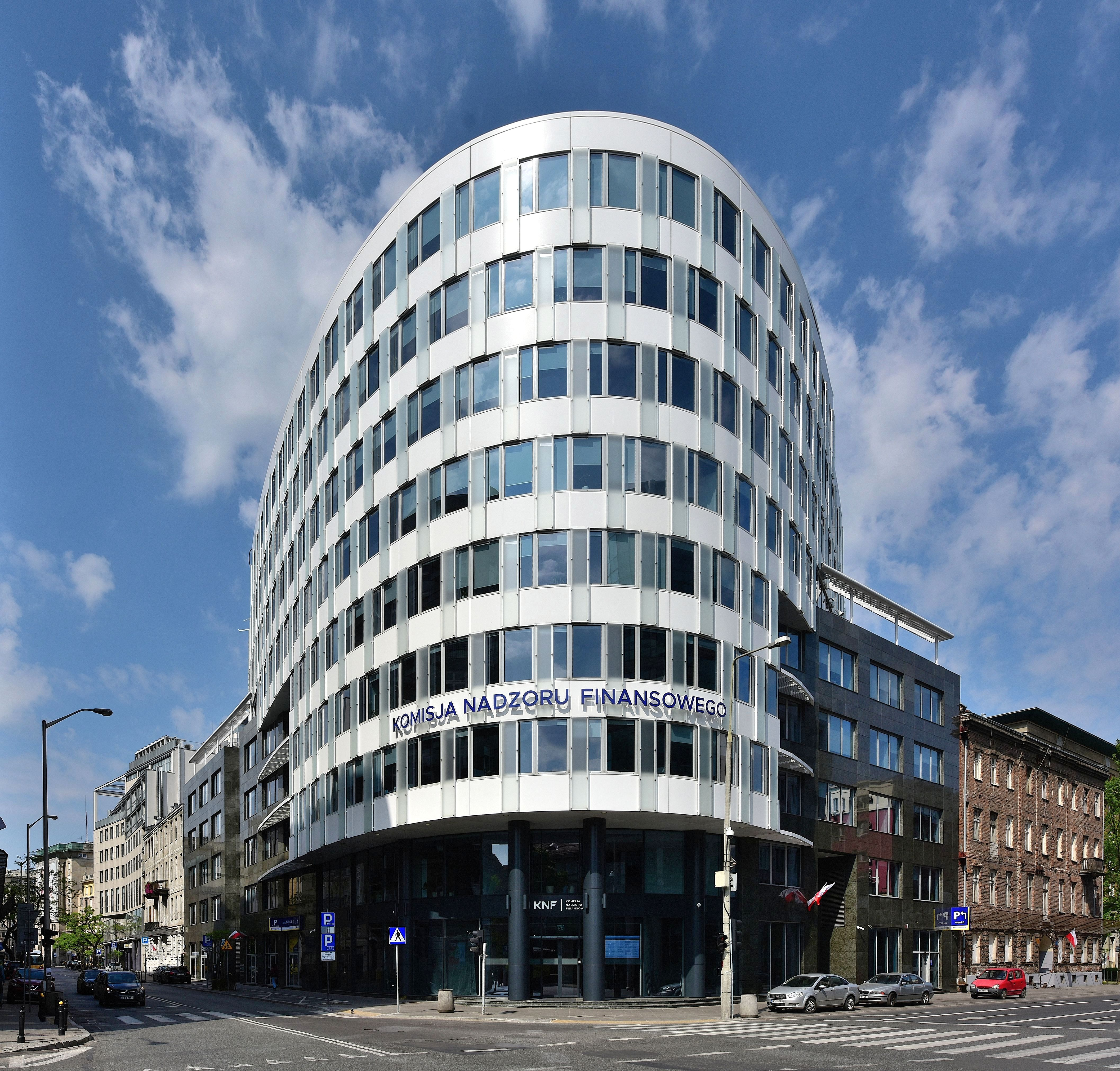 Siedziba KNF i UKNF przy ul. Pięknej 20 w Warszawie